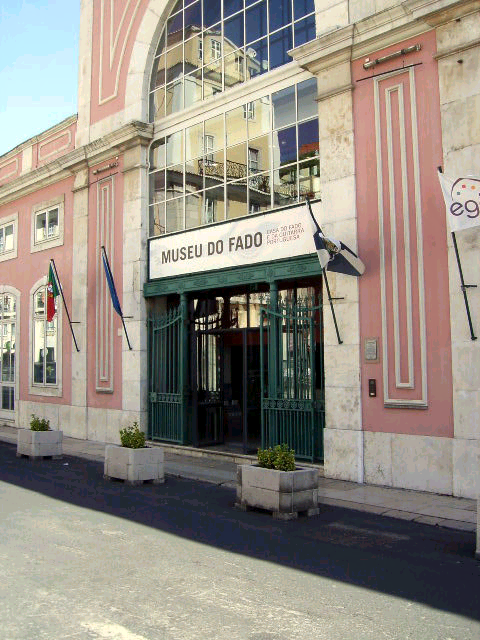 Fado Museum in Lisbon, Portugal / Museu do Fado, Lisboa, Portugal / Fado Museum, Lissabon, Portugal